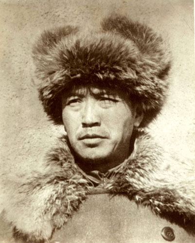 1937-1945年二战时期的乌兰夫